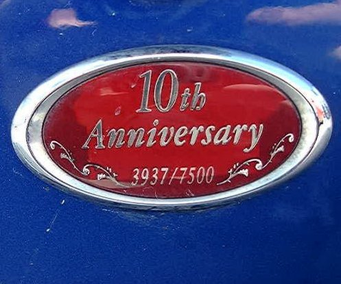 Mazda MX-5 10AM badge